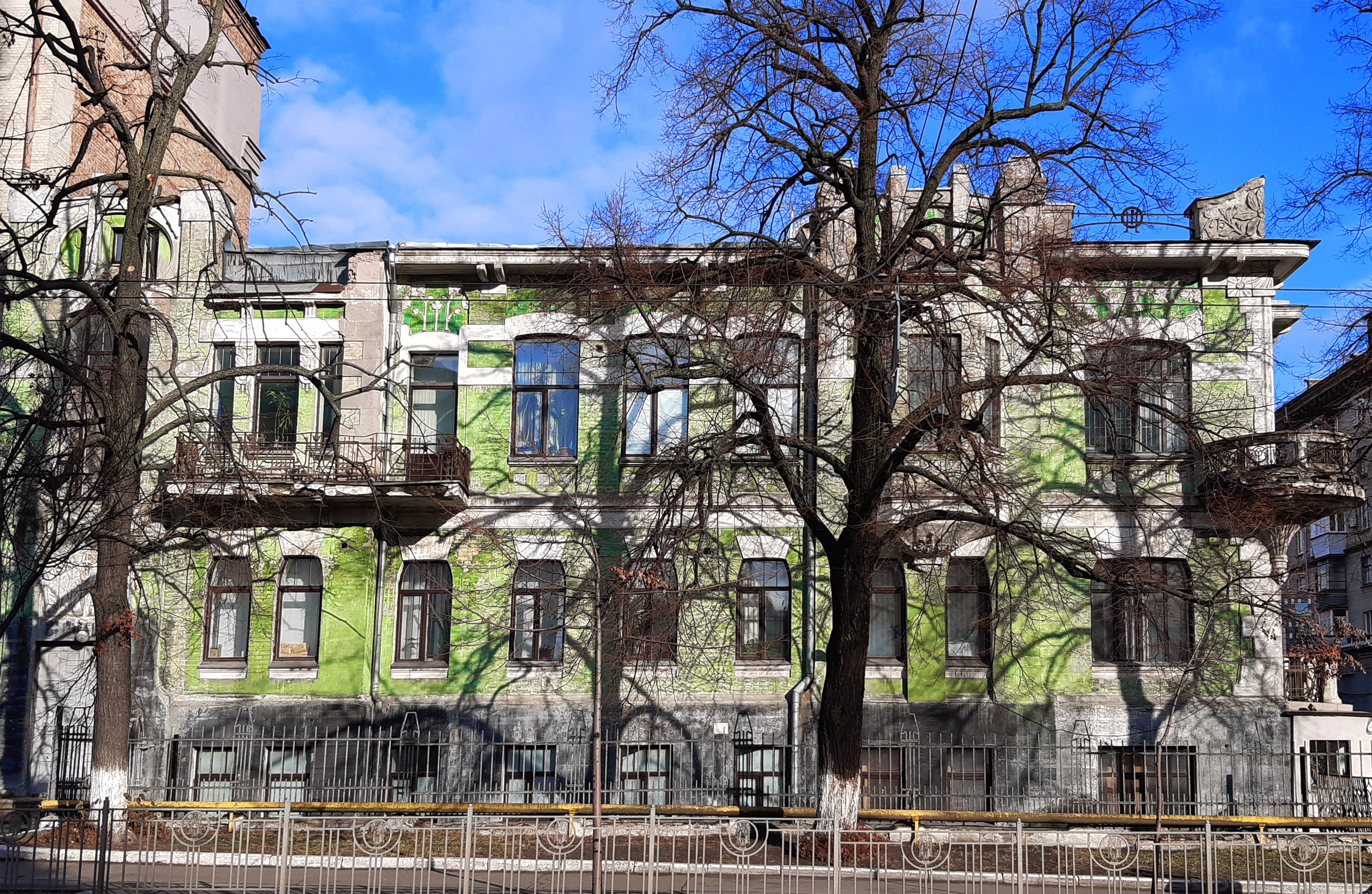 Будинок з ірисами, Київ, вулиця Юрія Іллєнка, 8